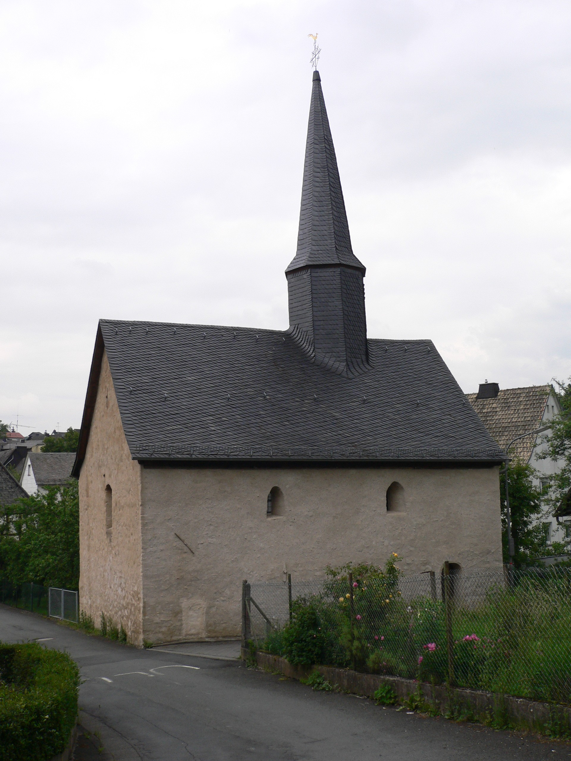 Alte Ev. Kirche (Kapelle) Wommelshausen